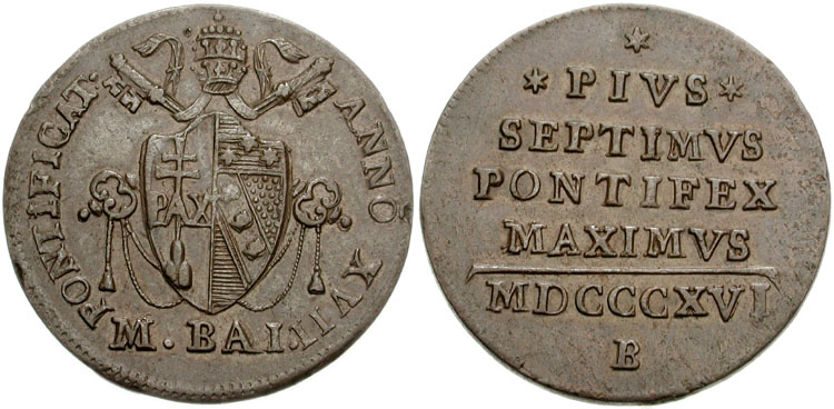 Italia, Stato pontificio. Pio VII. 1800-1823. Æ Mezzo Baiocco (27mm, 5.80 g). zecca di Bologna. Datato anno pontificio XVII (1816). Stemma papale su chiavi decussate. Sopra tiara. Intorno PONTIFICAT. ANNO XVII. In esergo M. BAI. Legenda su quattro righe PIVS/SEPTIMVS/PONTIFEX/MAXIMVS. Sotto data: MDCCCXVI (1816) e segno di zecca (B). Italy, Papal States. Pius VII. 1800-1823. Æ Half Baiocco (27mm, 5.80 g). Bologna mint. Dated RY 17, AD 1816. Papal coat-of-arms. around PONTIFICAT. ANNO XVII. In exergue M. BAI. Legend PIVS/SEPTIMVS/PONTIFEX/MAXIMVS. Date: MDCCCXVI (1816) and mintmark. (B) KM 1278.